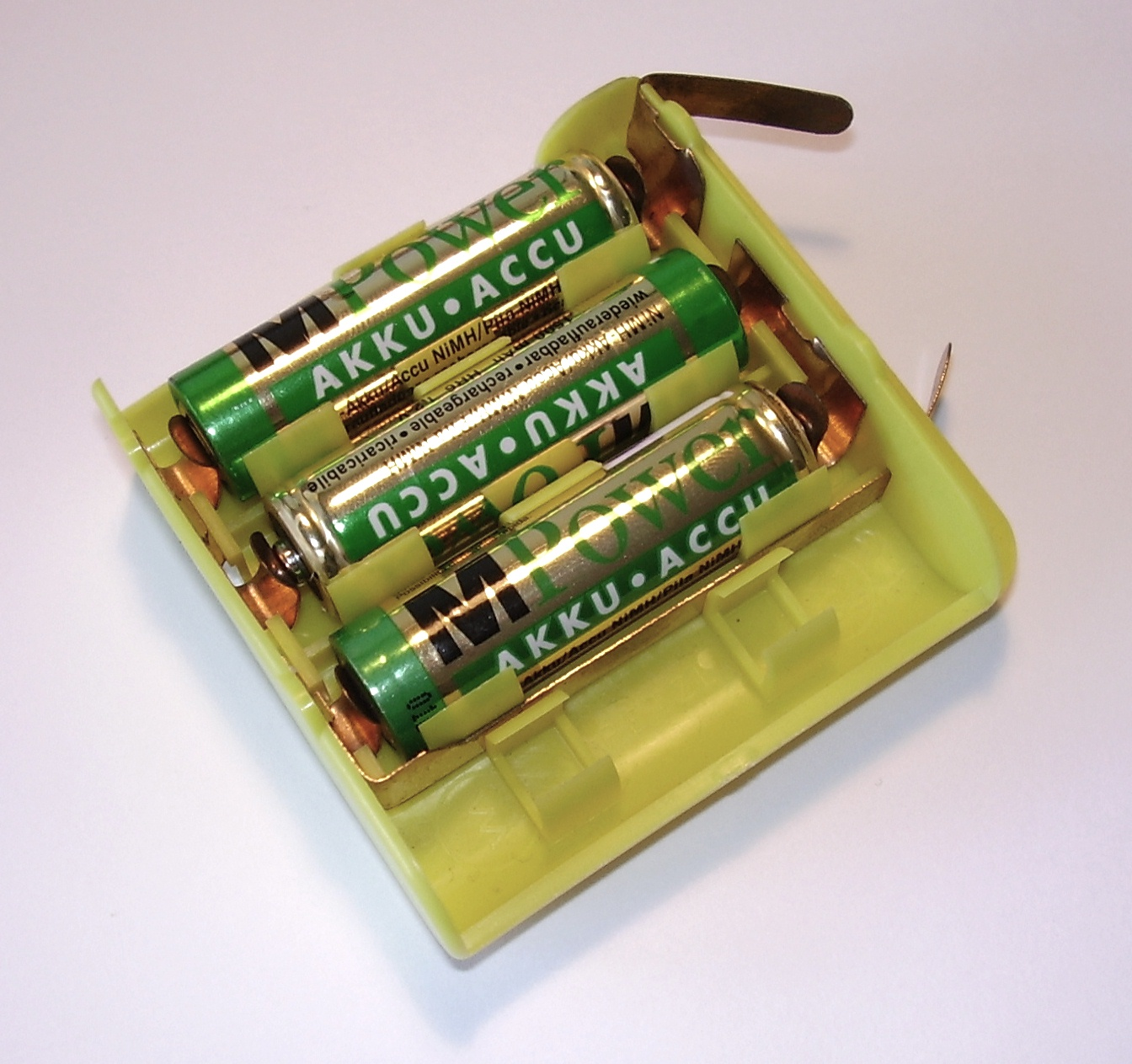 Selber fotografiert am 17. August 2005. David Croll / Keimzelle Wer einen solchen Adapter beschaffen möchte... ...ich habe diesen bei Transa gekauft ( Im Katalog von Transa habe ich keinen Adapter gefunden; im Laden sollten sie aber verfügbar sein... Wem diese schweizerische Firma zu weit weg ist: Geht sonst in ein Outdoor-/Trekkingfachgeschäft und fragt euch dort rum. Alternative: ...irgendwie kann man dieses gerät schon an eure bestehende Lampe anschliessen. Gruss, --Keimzelle talk 00:52, 30. Mär 2006 (CEST)